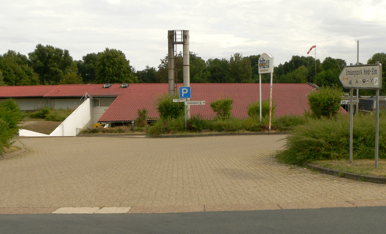 Einfahrt zum Erholungspark Elm in Räbke